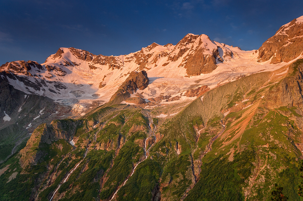 Национальный парк Алания, Ирафский район This image is related to the protected area of Russia number 1500198